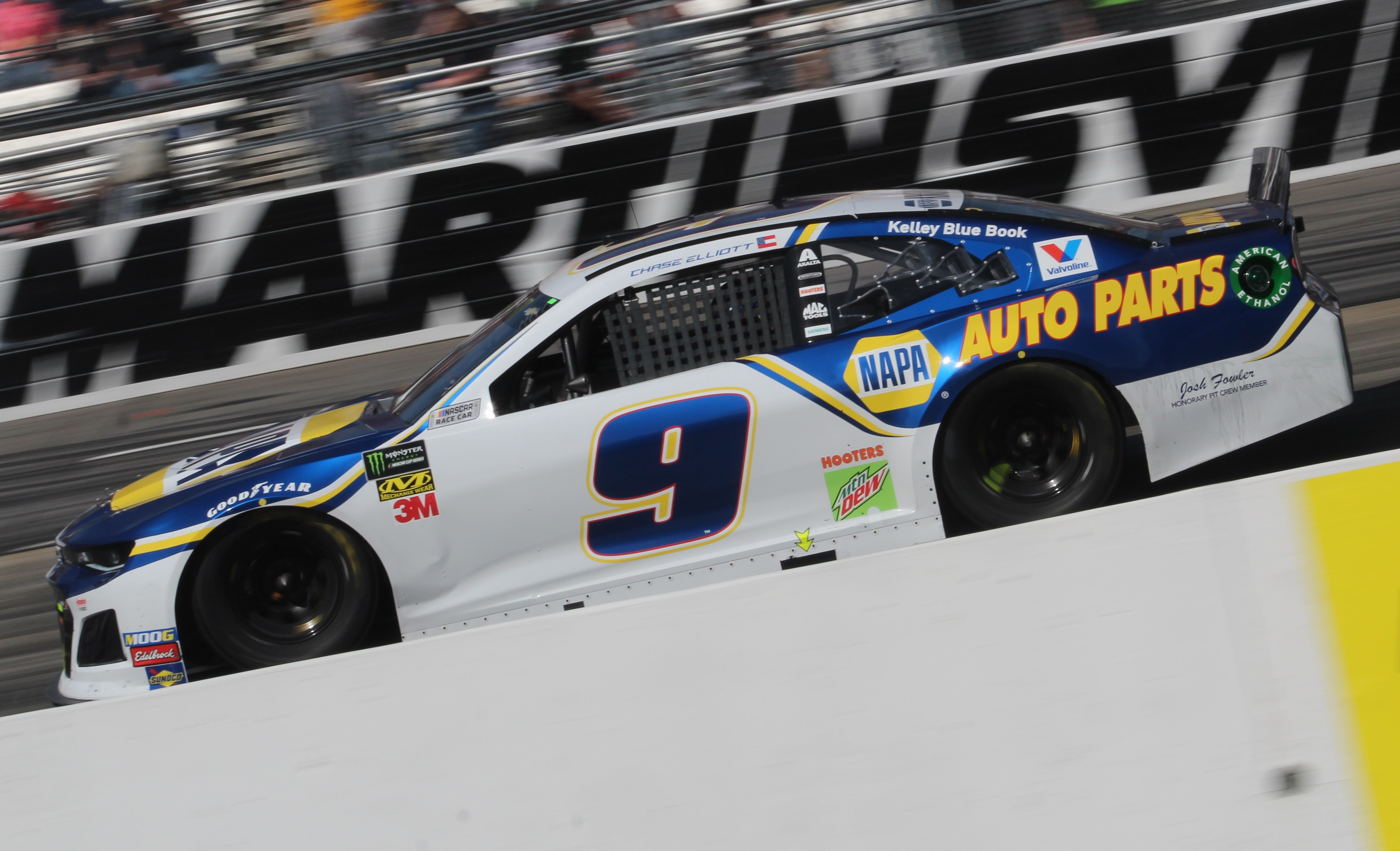 2019 STP 500